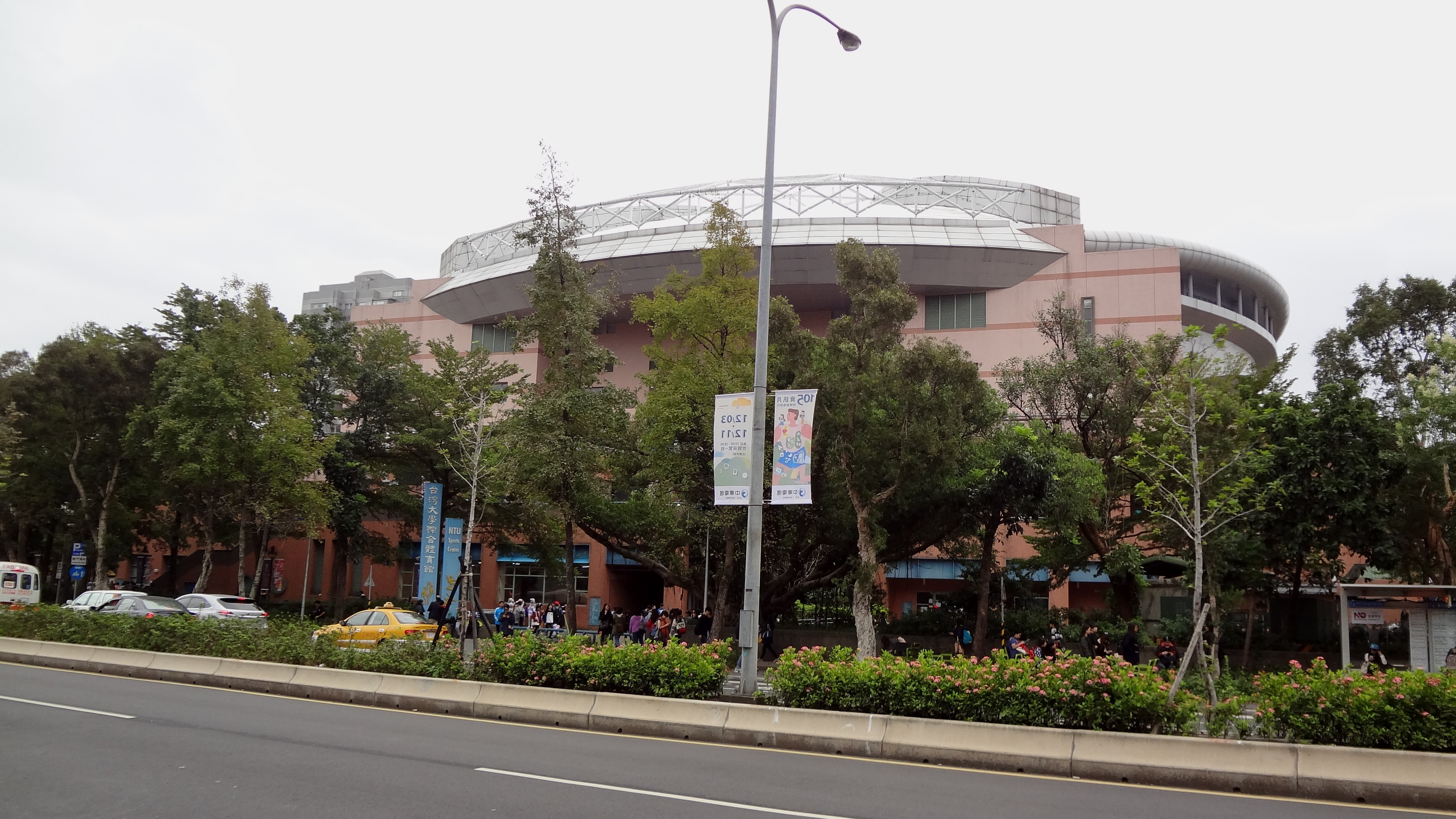 第44屆台灣同人誌販售會第二日，國立臺灣大學綜合體育館新生南路側外觀。